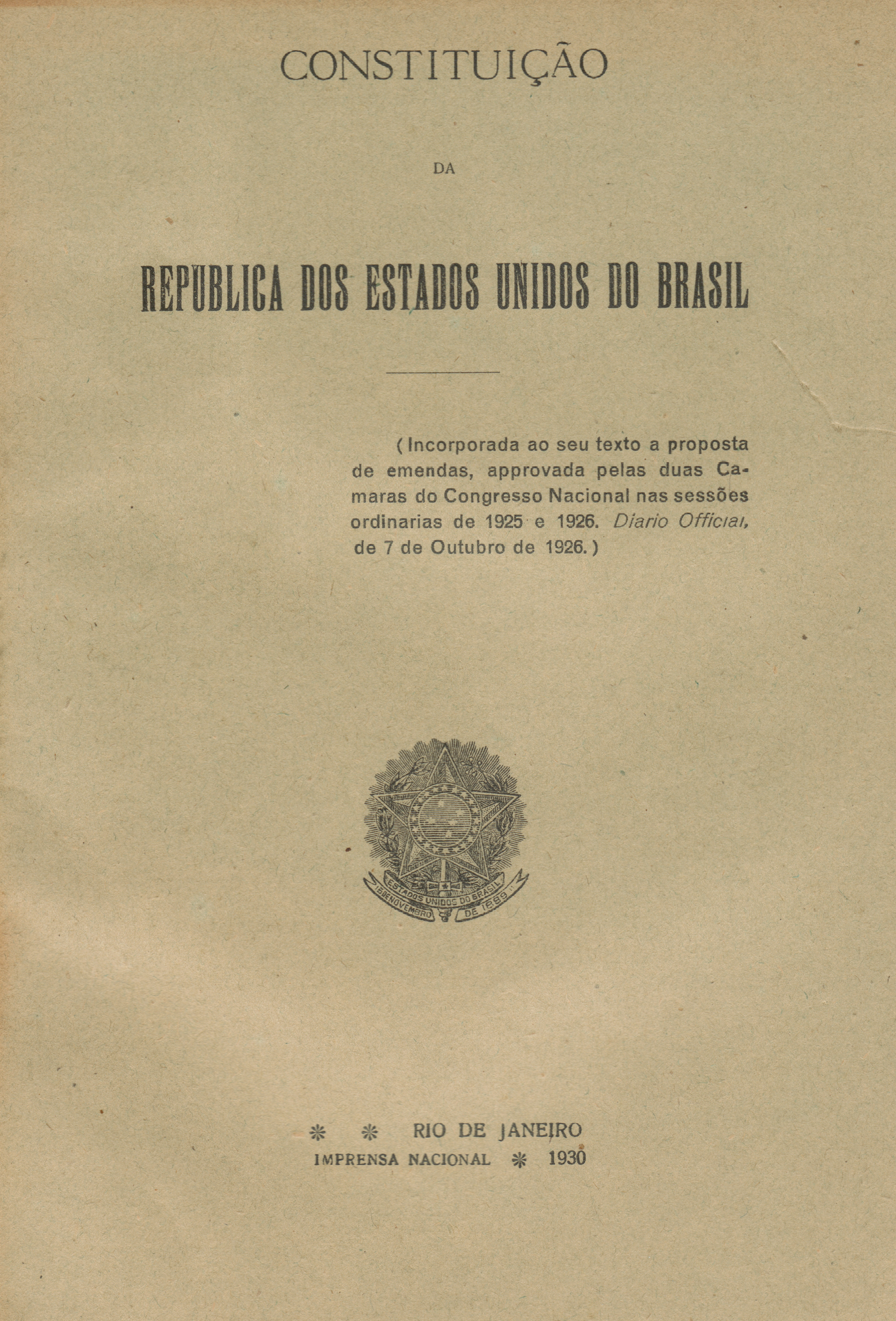 Capa da Constituição do Brasil de 1891 em impresso da Imprensa nacional em 1930.